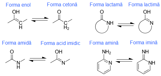 Diferite exemple de tautomeri